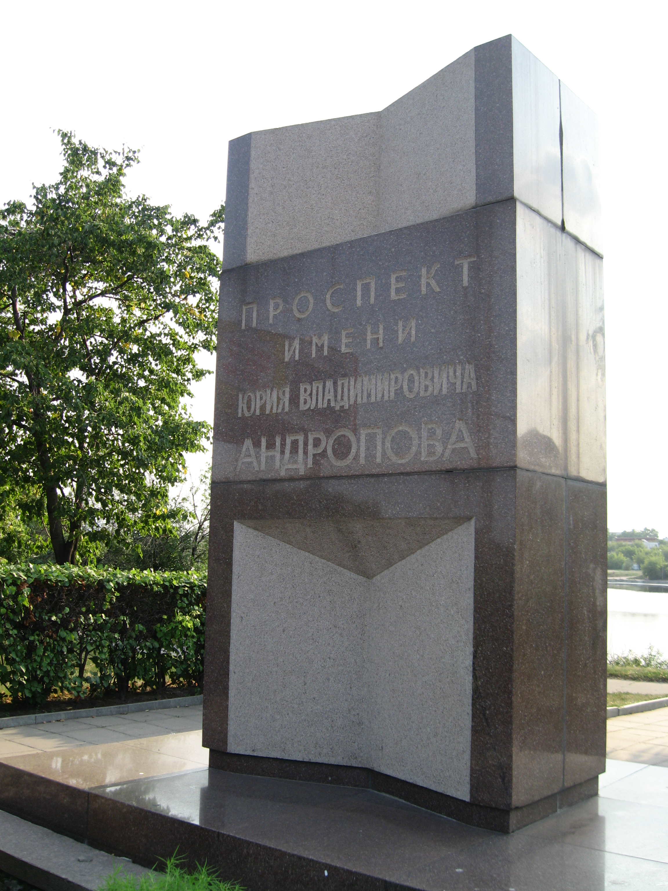 Мемориальный камень говорящий о том, что проспект назван в честь Юрия Владимировича Андропова